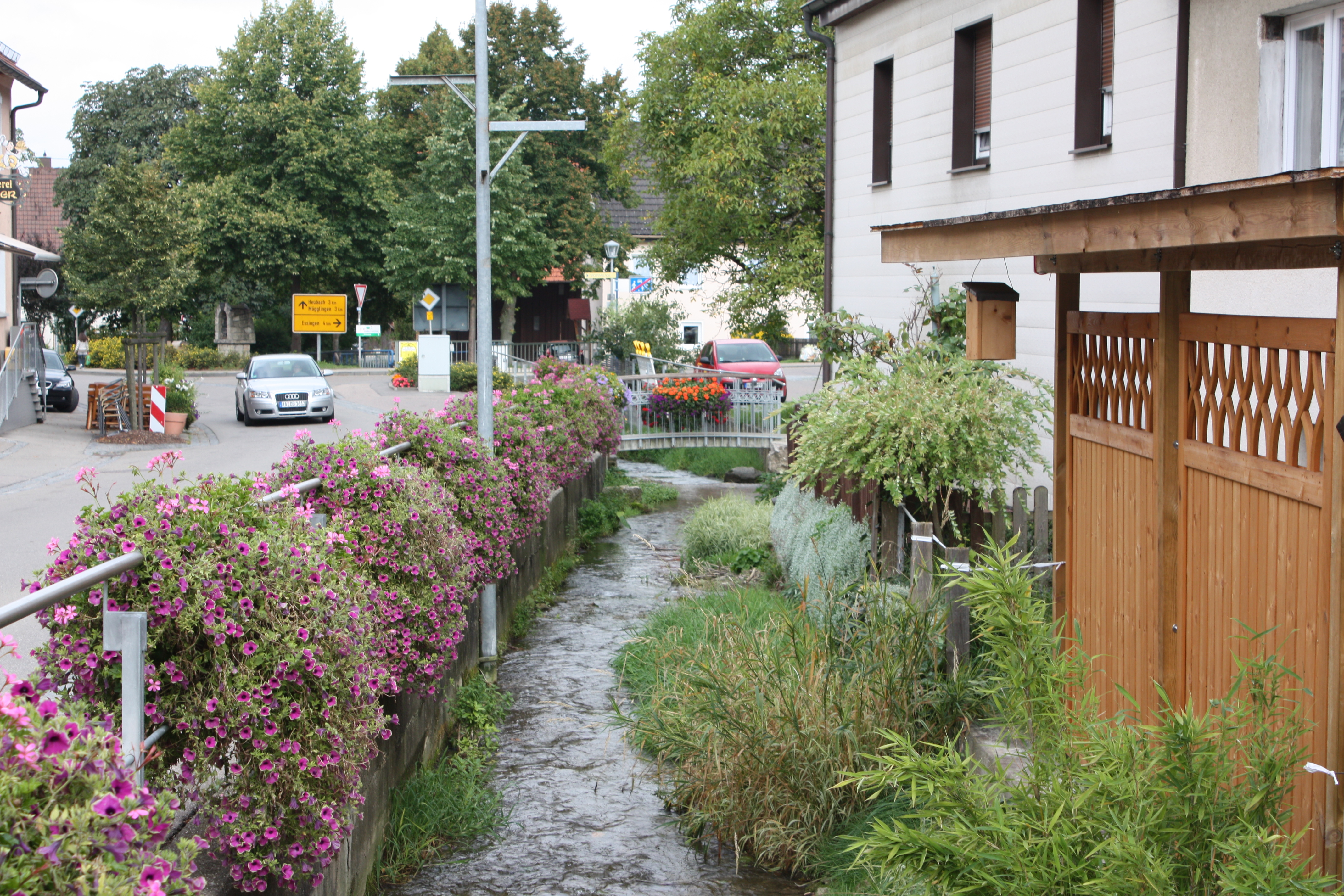 Die Lauter (Rems) in Lautern (Heubach), Blick nach Norden